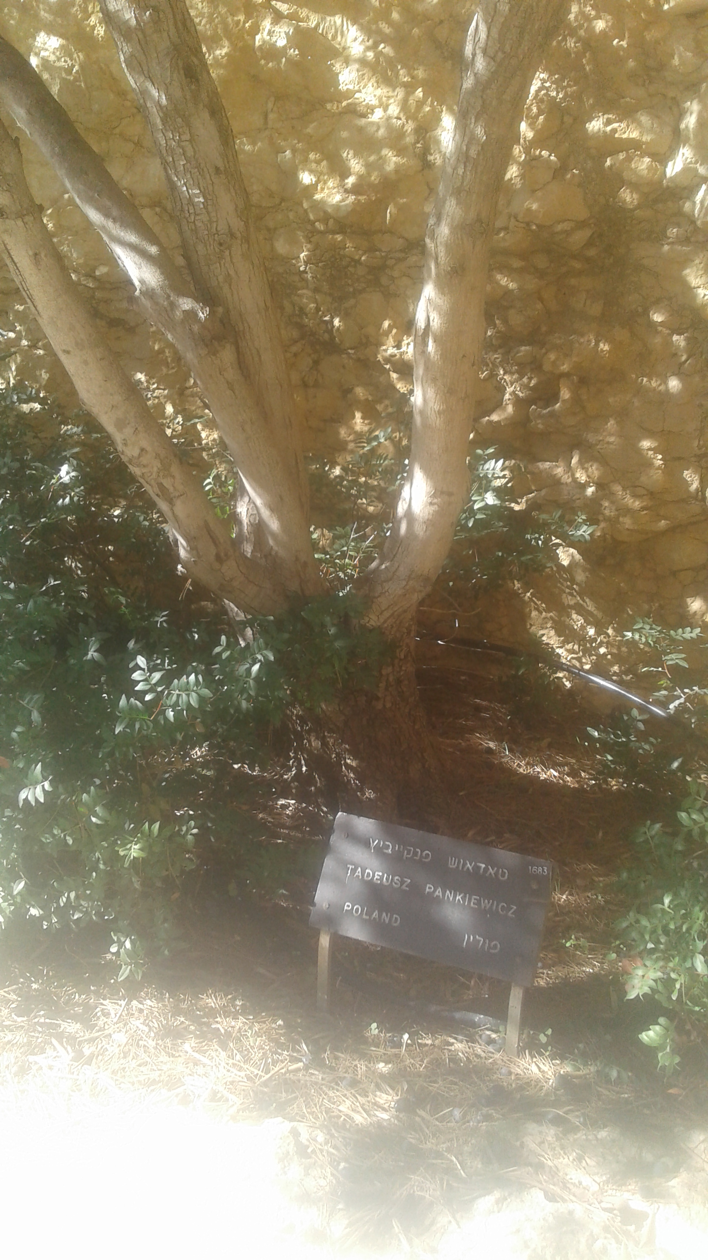 העץ שניטע לכבוד תדאוש פנקייביץ' ביד ושם